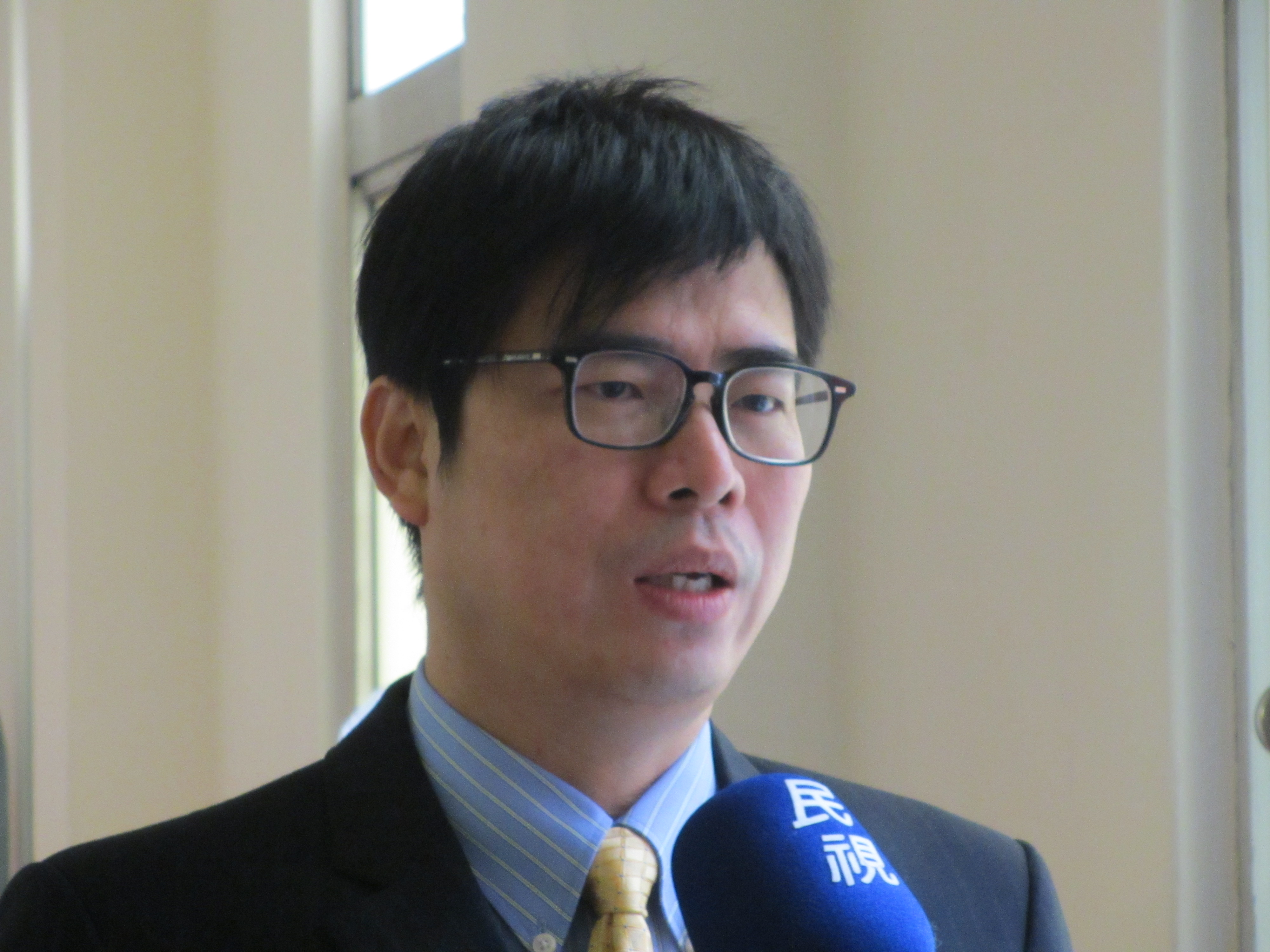 中文（台灣）: 民進黨立委陳其邁(美國之音張永泰拍攝)